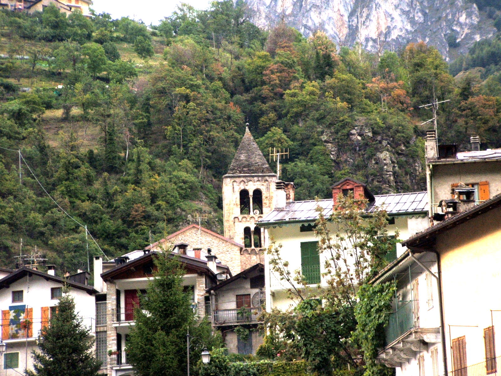 Valle Stura di Demonte - Immagine da Vinadio